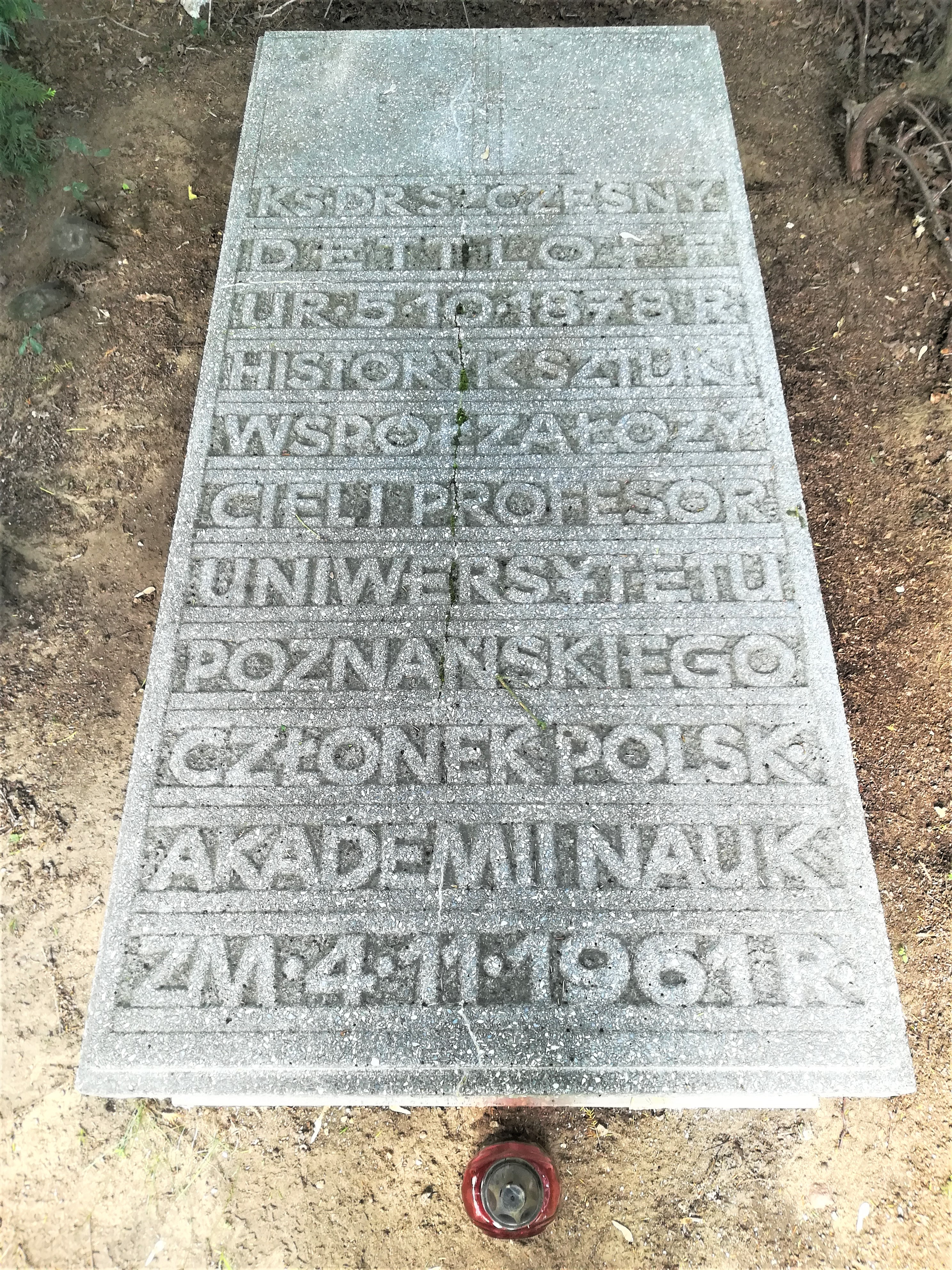 Grób Szczęsnego Dettloffa na cm. junikowskim w Poznaniu.